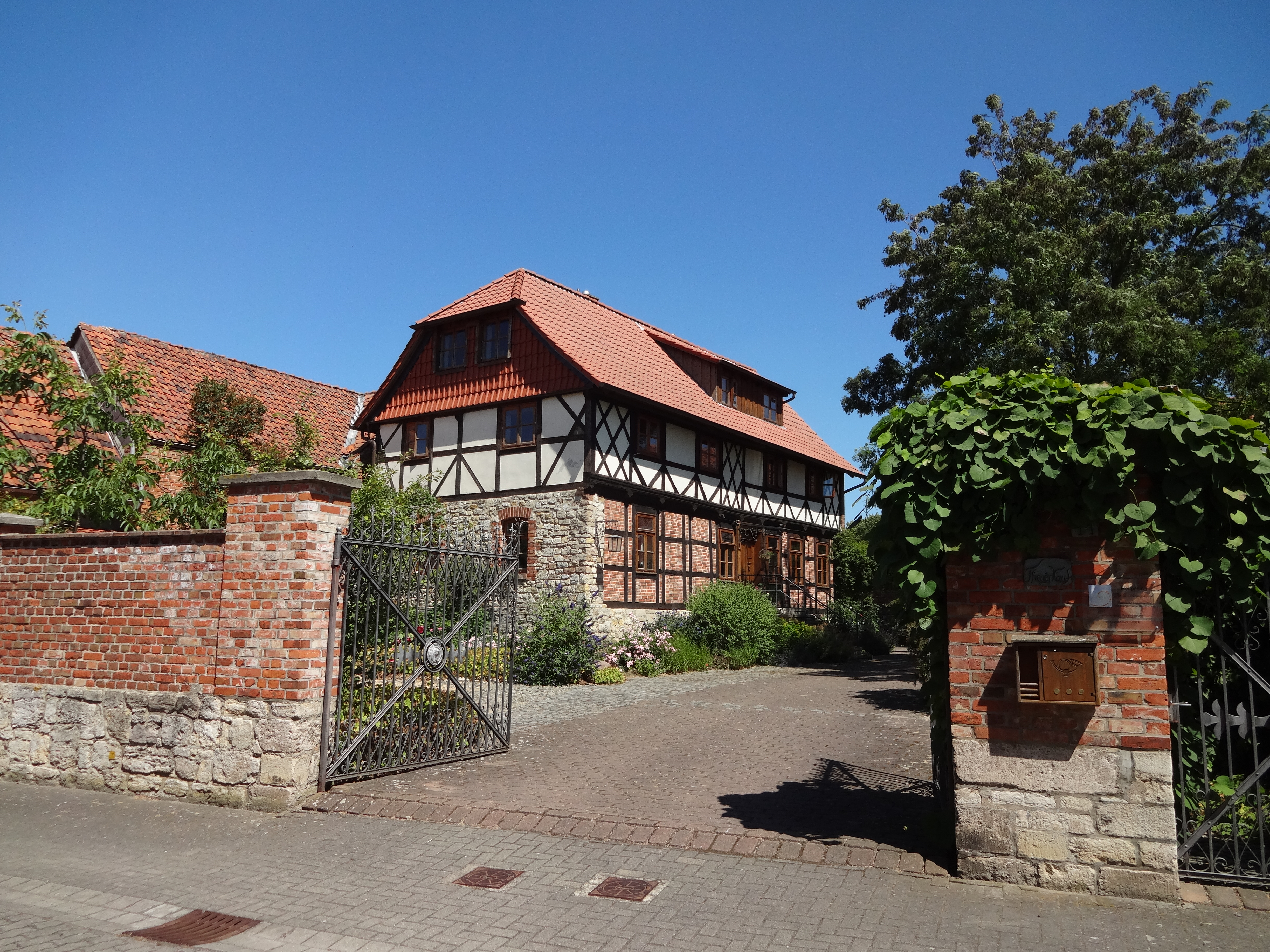 denkmalgeschütztes Bauernhaus in der Hinterstraße 11 in Dedeleben